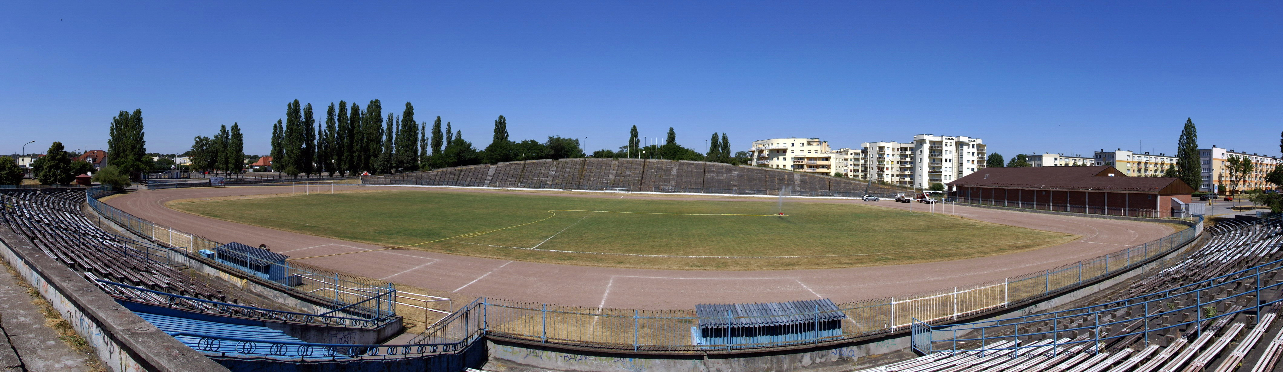 "Chemik" Bydgoszcz - panorama stadionu (zdjęcie złożone z 11 zdjęć przy pomocy programu Hugin).